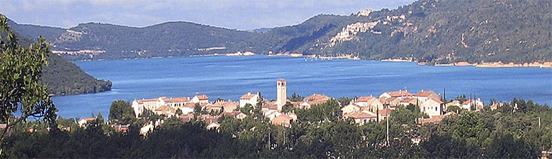 Le lac de Sainte-Croix : au premier plan, Les Salles-sur-Verdon ; au second plan, le village de Sainte-Croix.